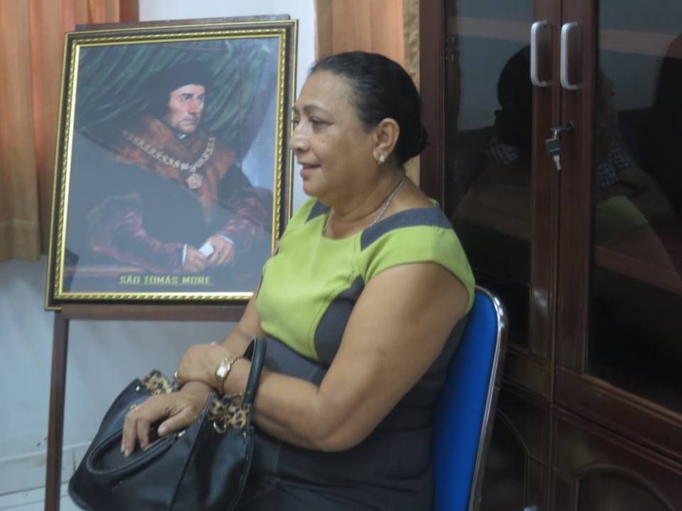 Maria Domingas Alves, Kommissarin der Comissão da Função Pública